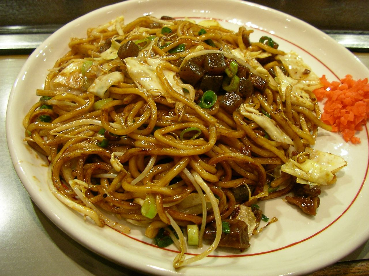 豚やきそば＋スジトッピング追加